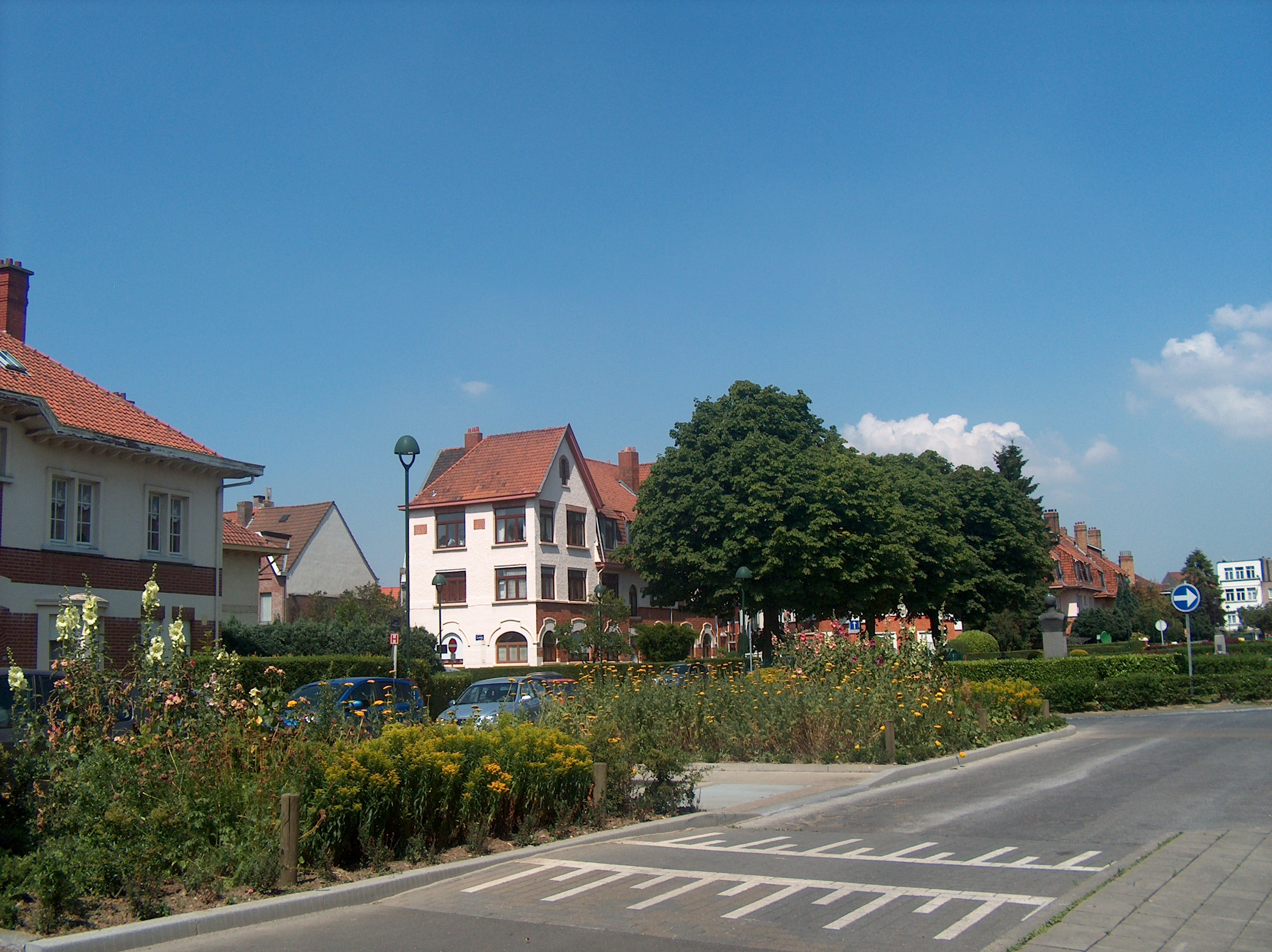 L'avenue Raymond Foucart à Schaerbeek, Bruxelles, Belgique.